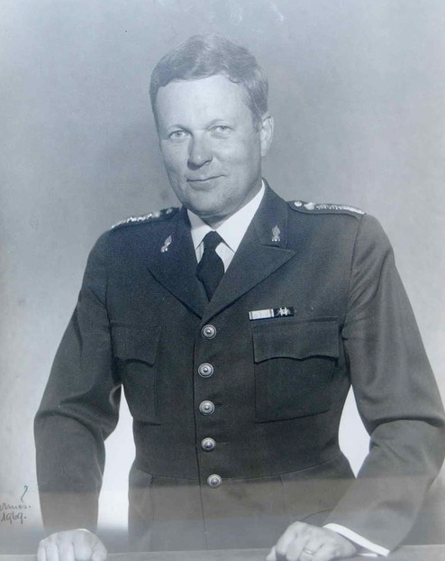 Bengt Liljestrand, regementschef vid Bodens artilleriregemente (A 8) 1968–1969. Chef MHS 1973, Chef UNEF 1975–1976, Chef FHS 1978.